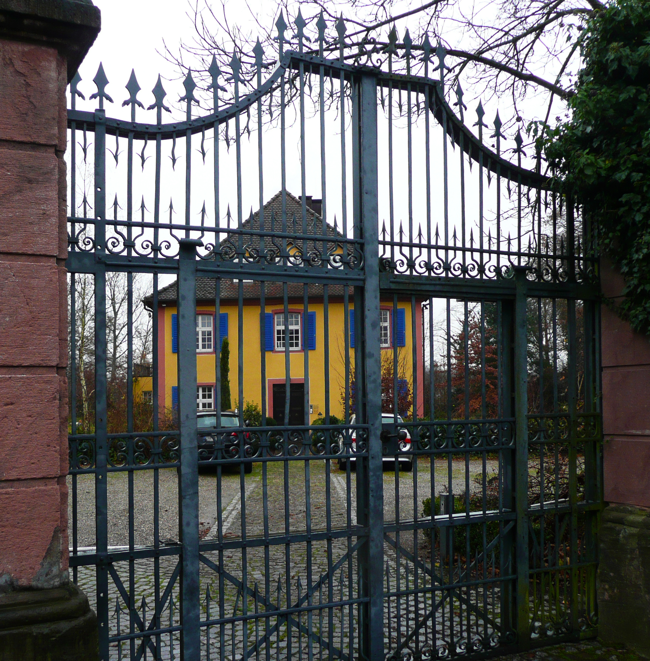 Schloss in Buchheim (March). Bis 1791 Sitz der Ortsherrenfamilie Stürtzel von Buchheim. Ansicht von N.